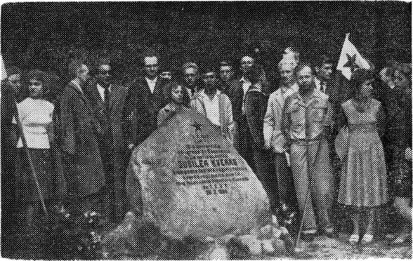 Dum la 15-a Internacia Junulara Kongreso de TEJO en Gdansk (24—31.VII.59) okazis en Sopot malgranda solenaĵo — malkovro de la memorŝtono okaze de replantigo de la „Jubilea Kverko”. La solenaĵon partoprenis Prezidanto de Urba Konsilantaro de Sopot Stanislaw Podraszko (en malhelaj okulvitroj) kaj Prezidanto de TEJO — Gŭnther Becker (maldekstre malantaŭ la ŝtono).